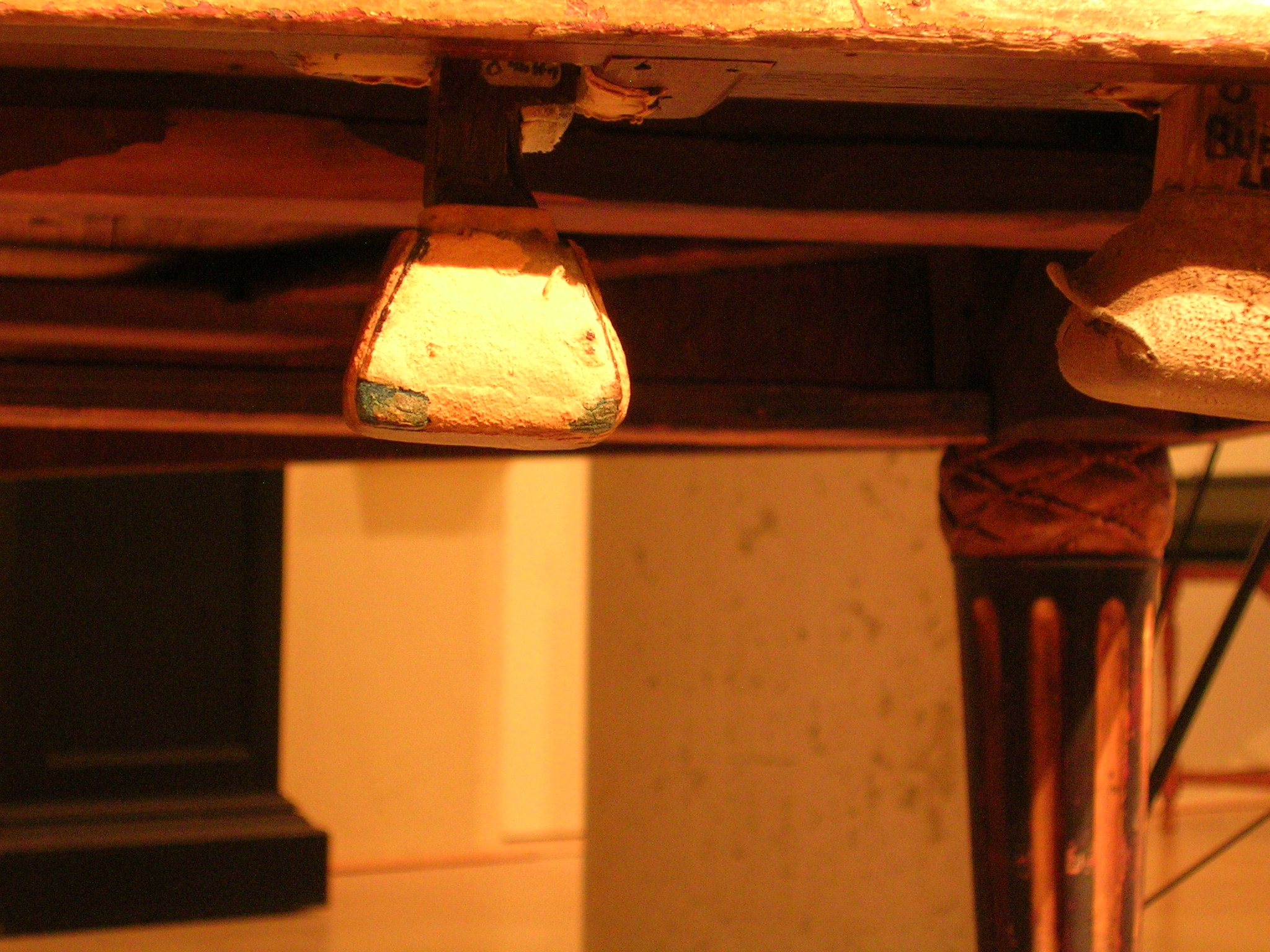 "genouilleres" of Taskin harpsichord (1788); Museum für Kunst und Gewerbe, Hamburg